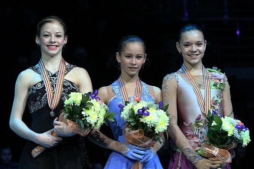 Подиум в женском одиночном катании на чемпионате мира по фигурному катанию 2012. Слева на право: Грейси Голд (США-серебро), Юлия Липницкая (Россия-золото), Аделина Сотникова (Россия-бронза)